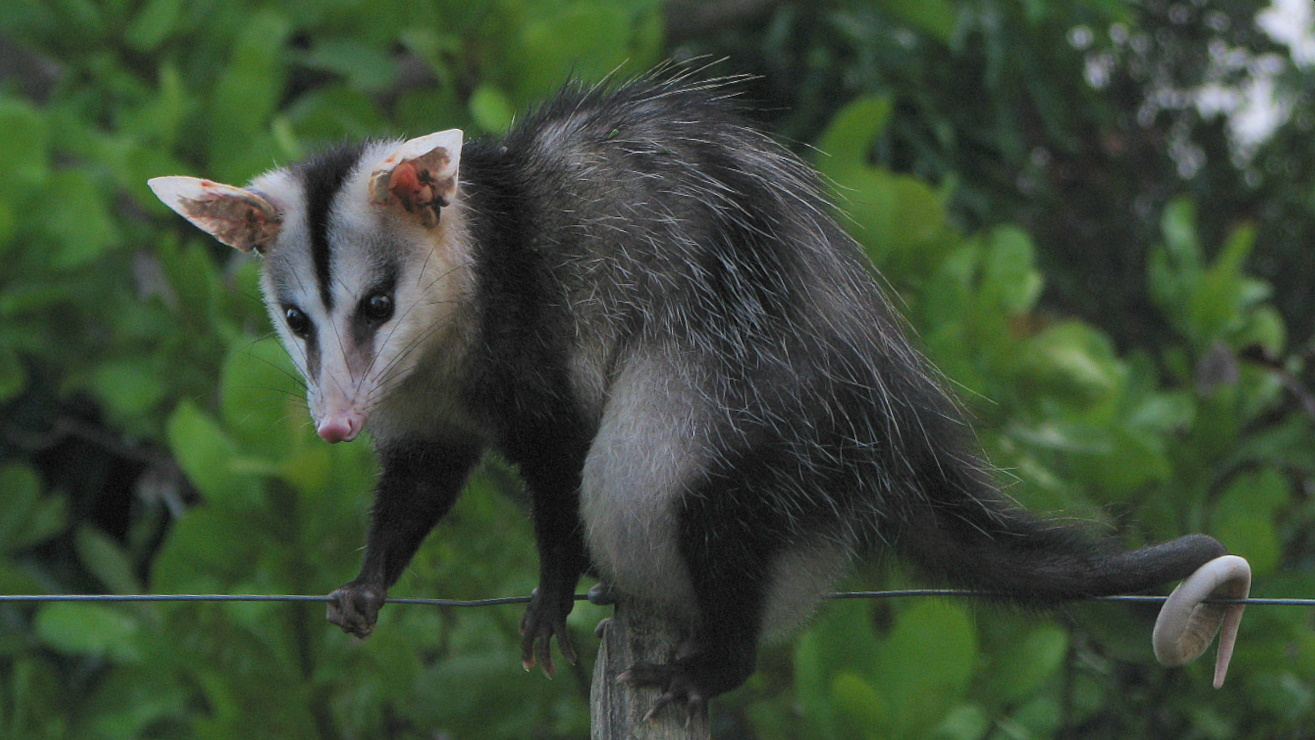 Didelphis albiventris, Bahia, Brazil.